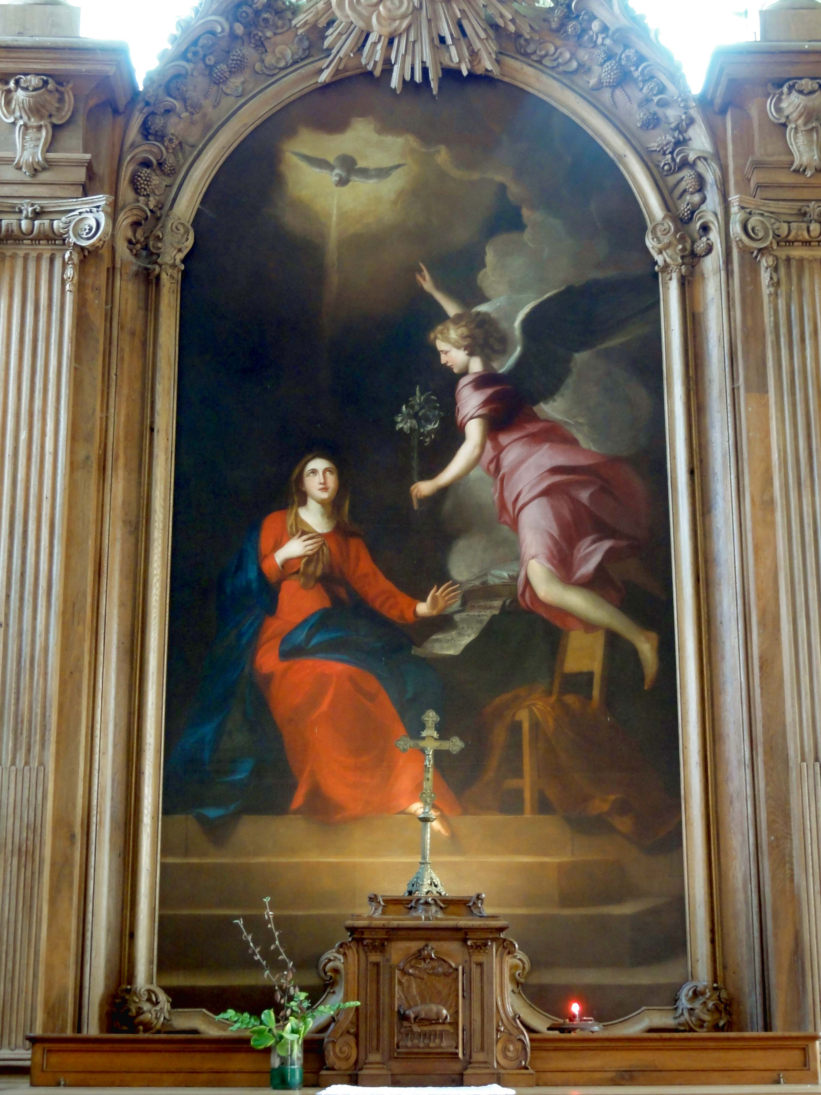 Mobilier de l'église - voir titre.